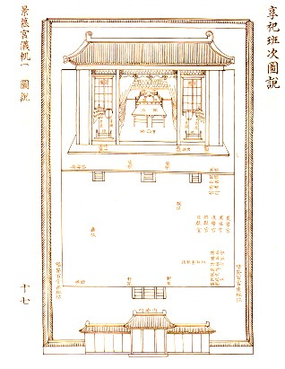 경모궁의궤향사반차도설